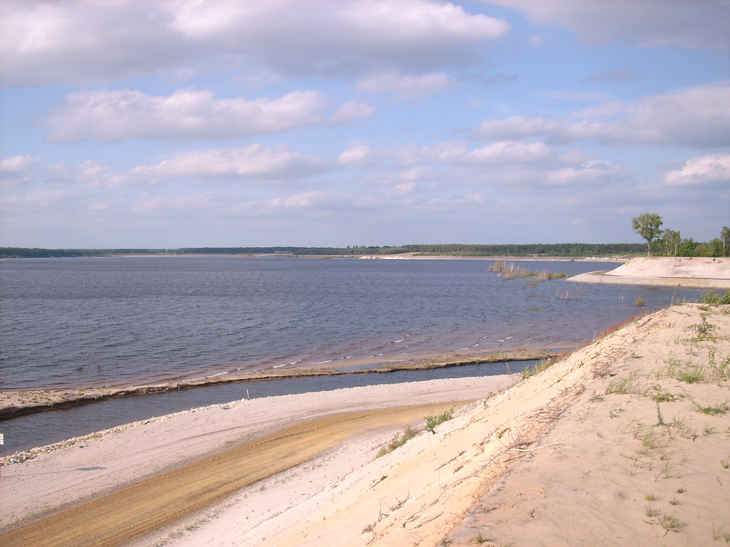 Geierswalder See bei Geierswalde (Elsterheide) Hornjoserbsce: Při Lejnjanskim jězorje